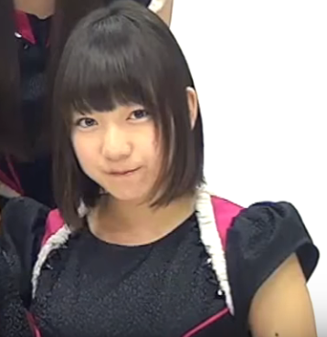 夢みるアドレセンスです。